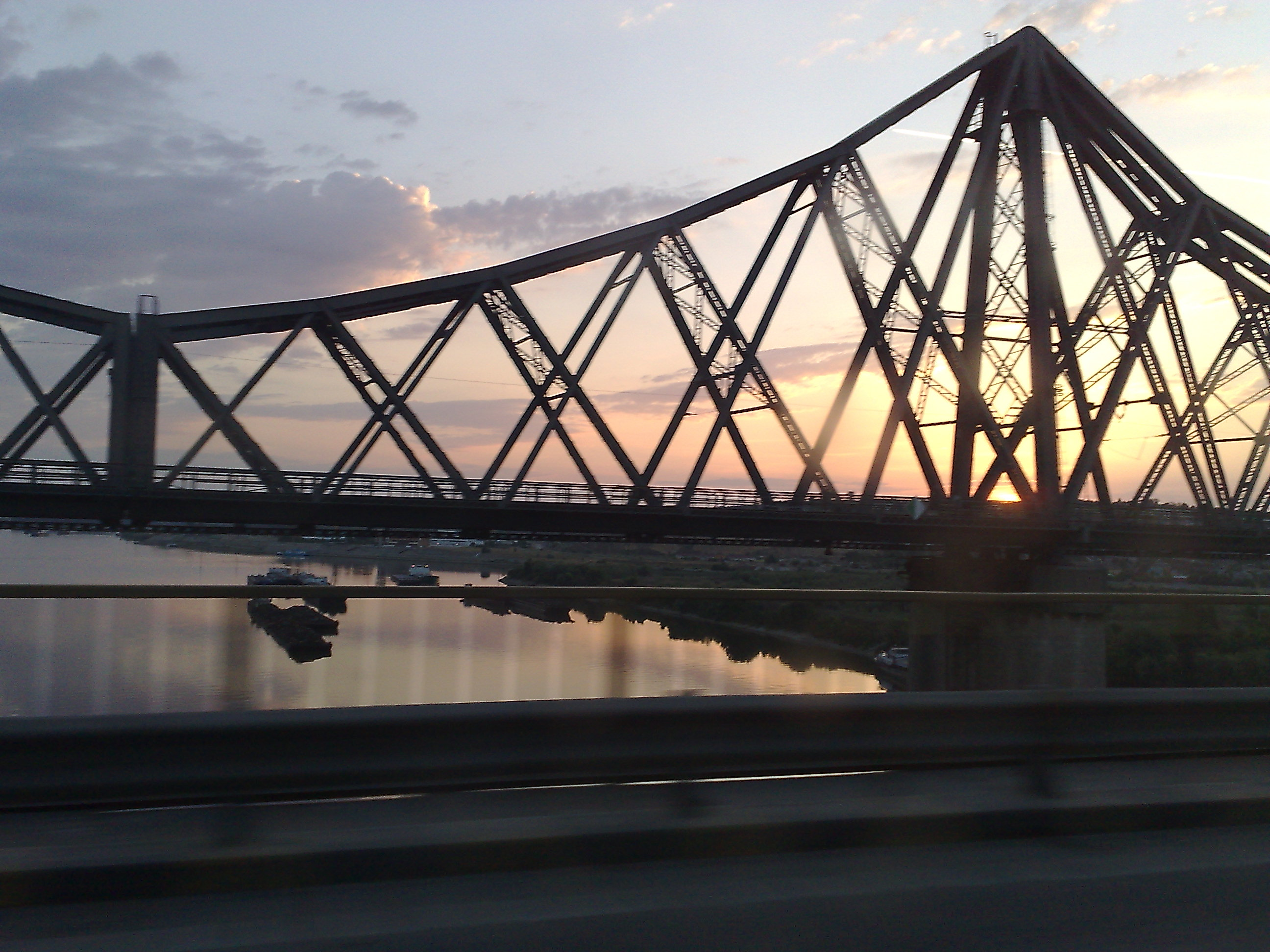 Podul peste Dunare vazut la rasarit, de pe podul pentru masini paralel cu acesta, fotografia a fost facuta in drum spre Bucuresti de la Constanta, in timpul toamnei.